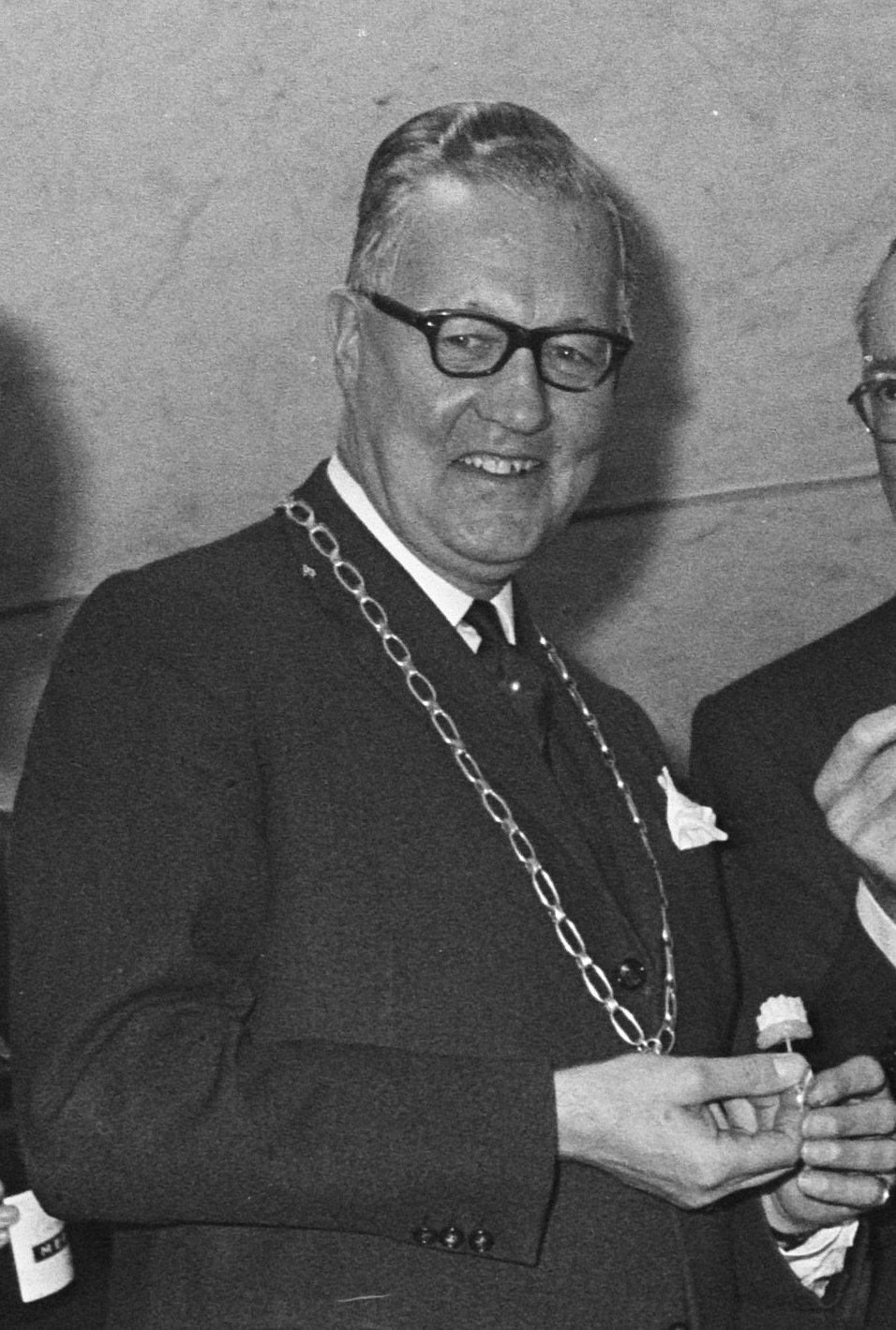 Prins Bernhard opende "Neclenburgh" drive-in voor Exportvoorlichting te Soest